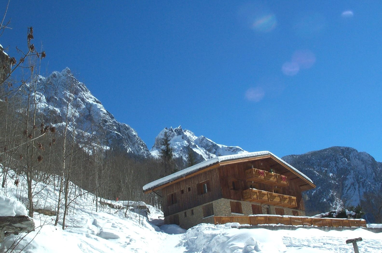 Chalet typique du Planay Chef Lieu 73350